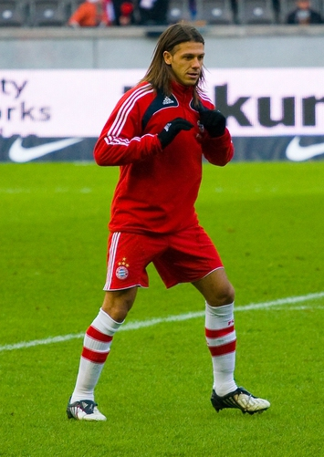 Martin Demichelis -beim Warmmachen